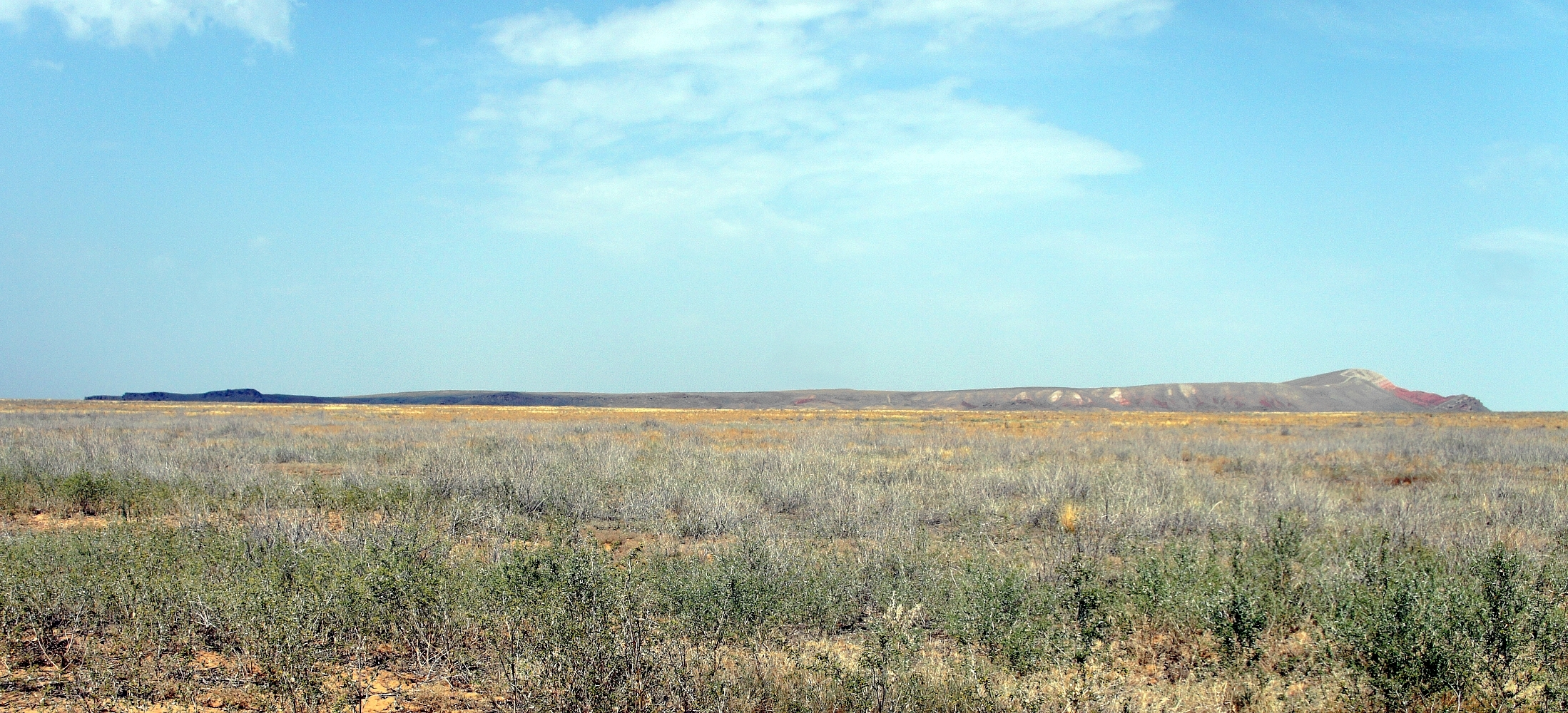 Гора Большое Богдо у озера Баскунчак